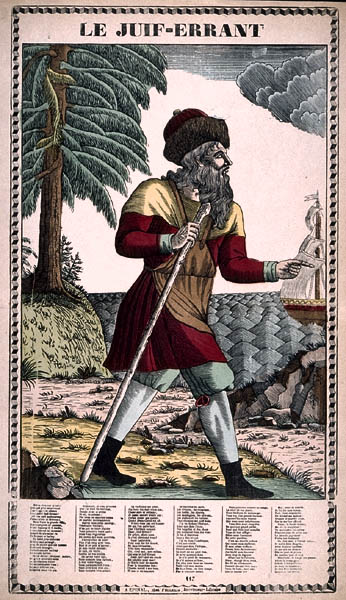 Wandering jew, Image d'Epinal